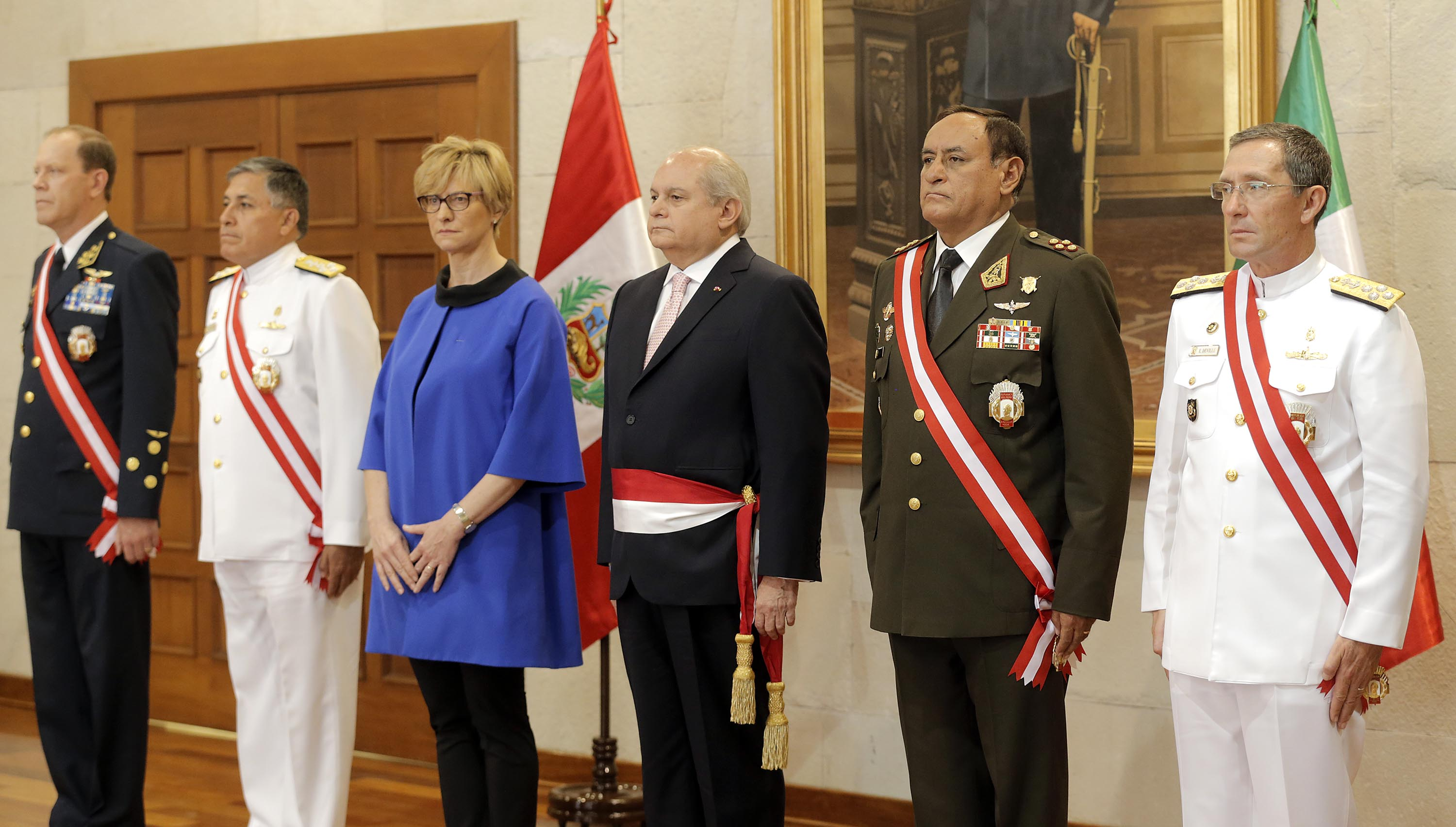 MINISTRO CONDECORÓ A SU HOMÓLOGA ITALIANA ROBERTA PINOTTI